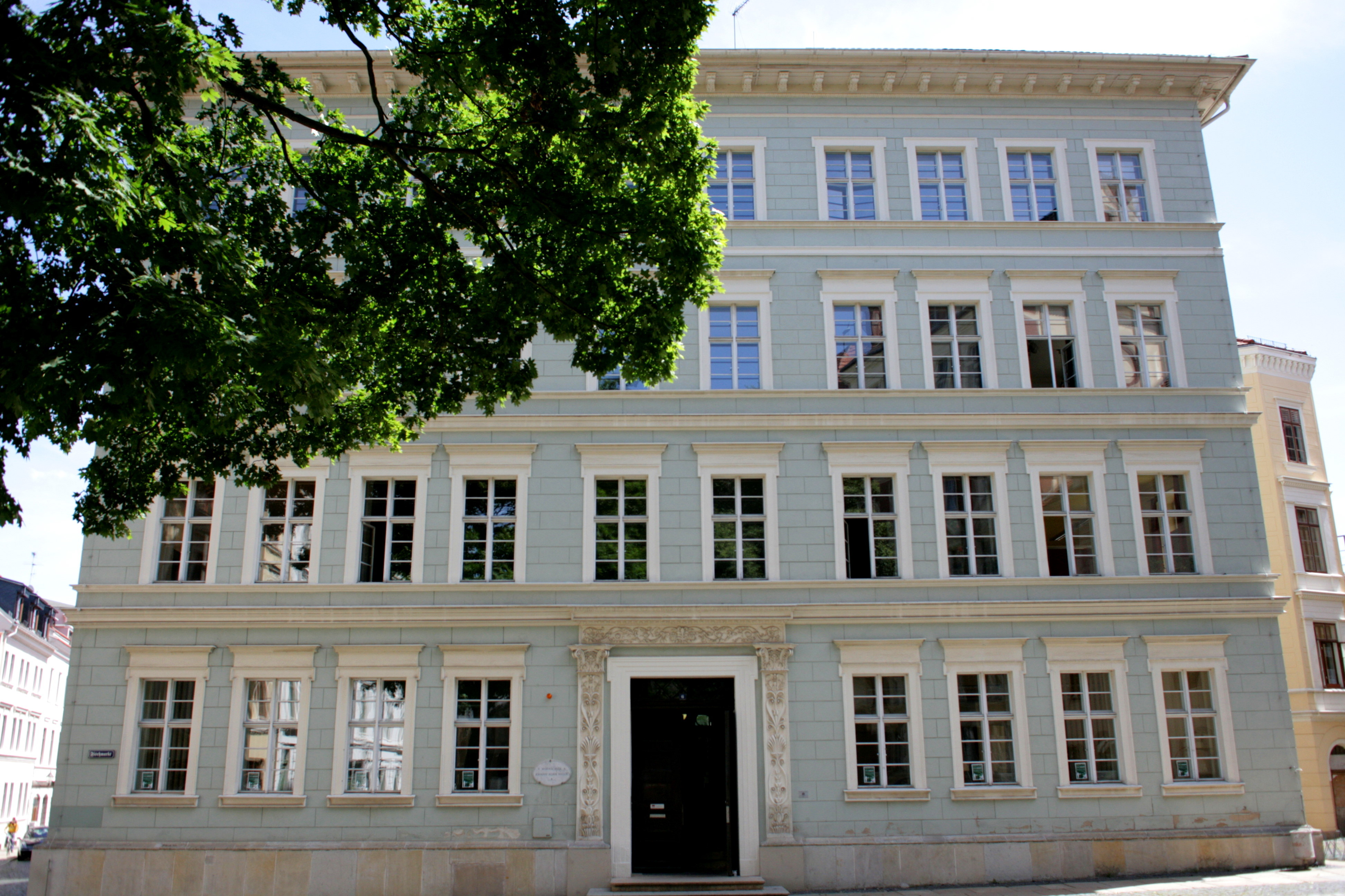 Musikschule “Johann Adam Hiller”, Fischmarkt in Görlitz